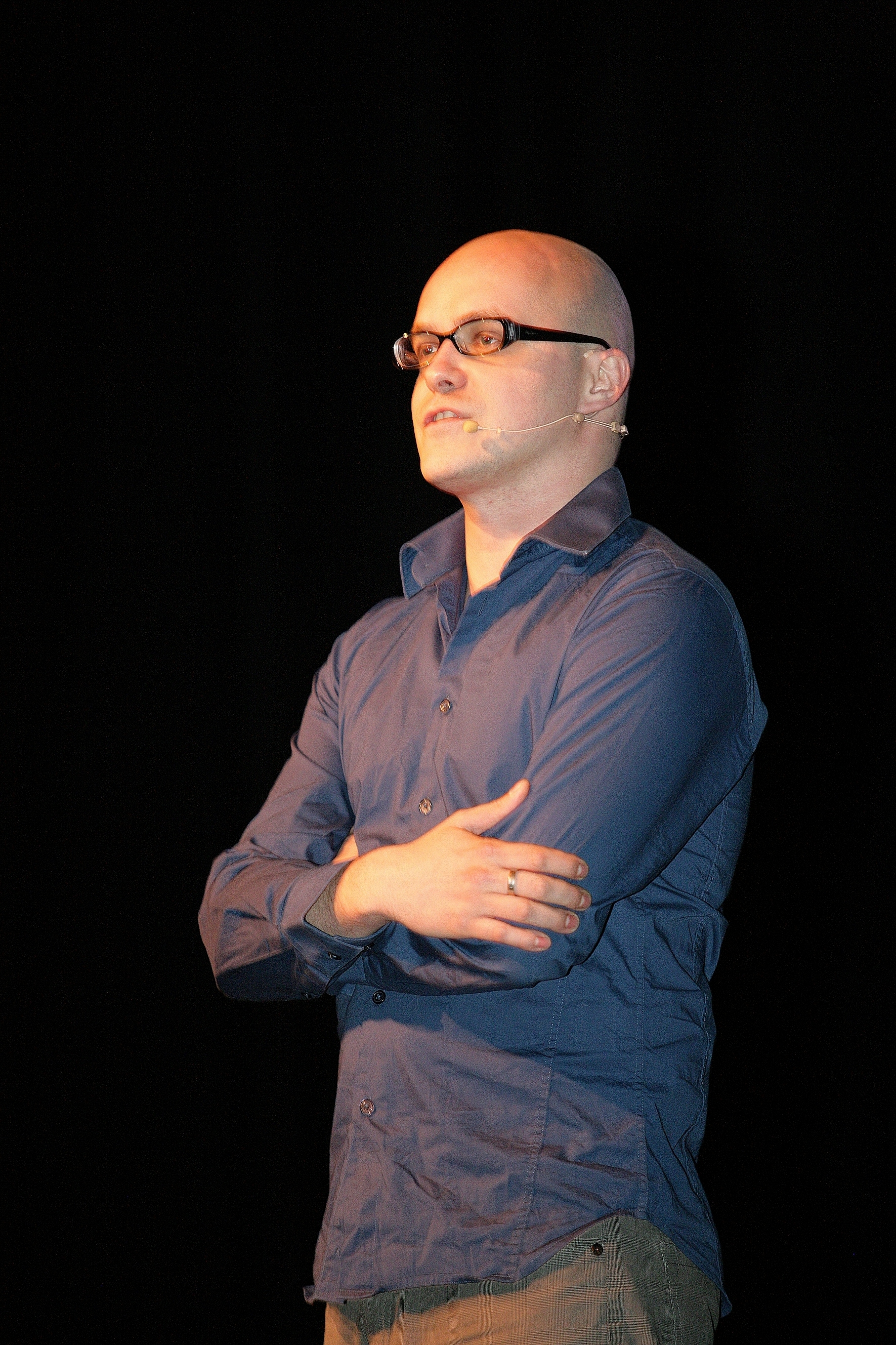 Philippe Geubels